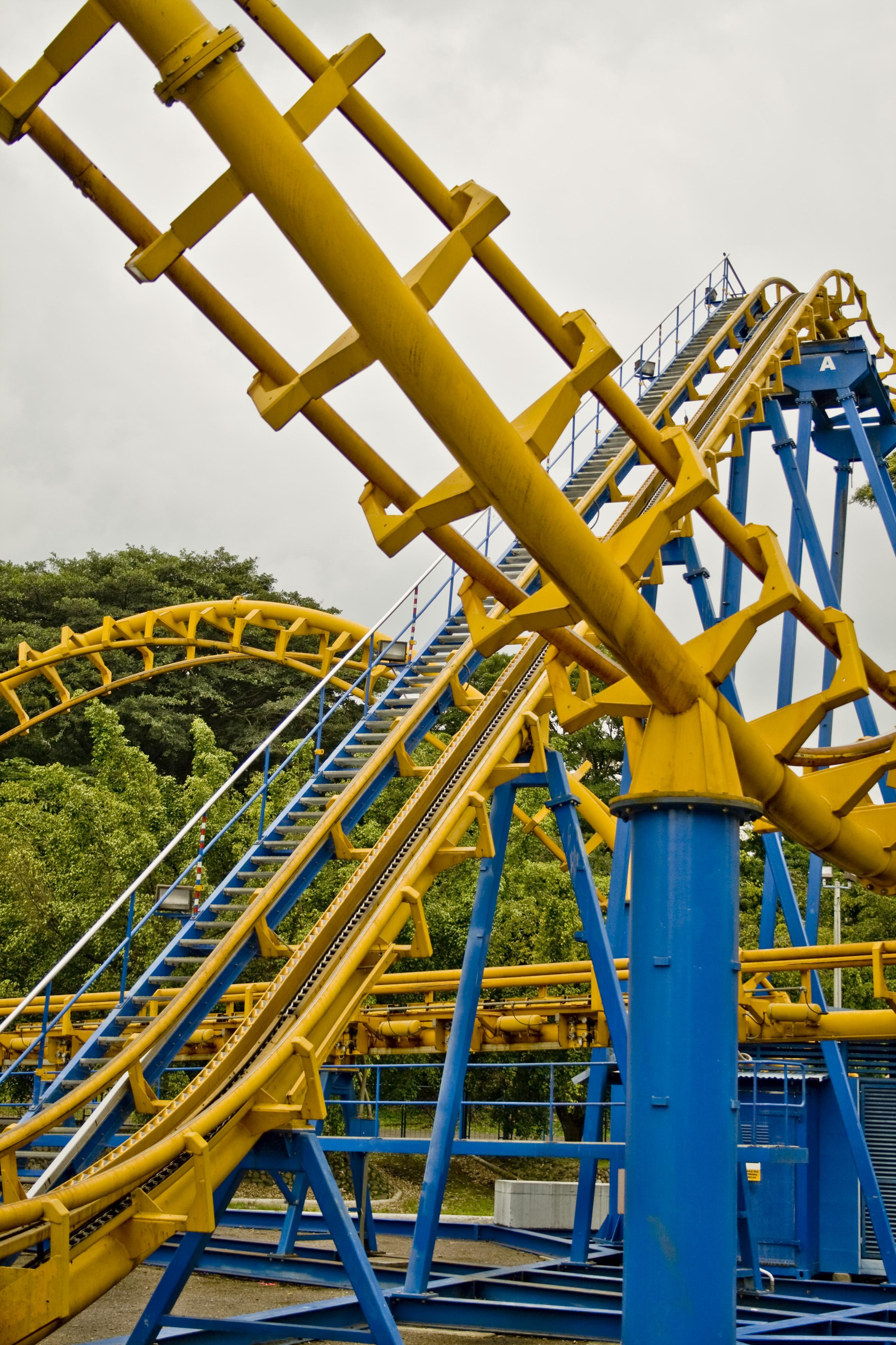 Montaña Rusa Bocaracá. Parque Nacional de Diversiones, San José, Costa Rica.